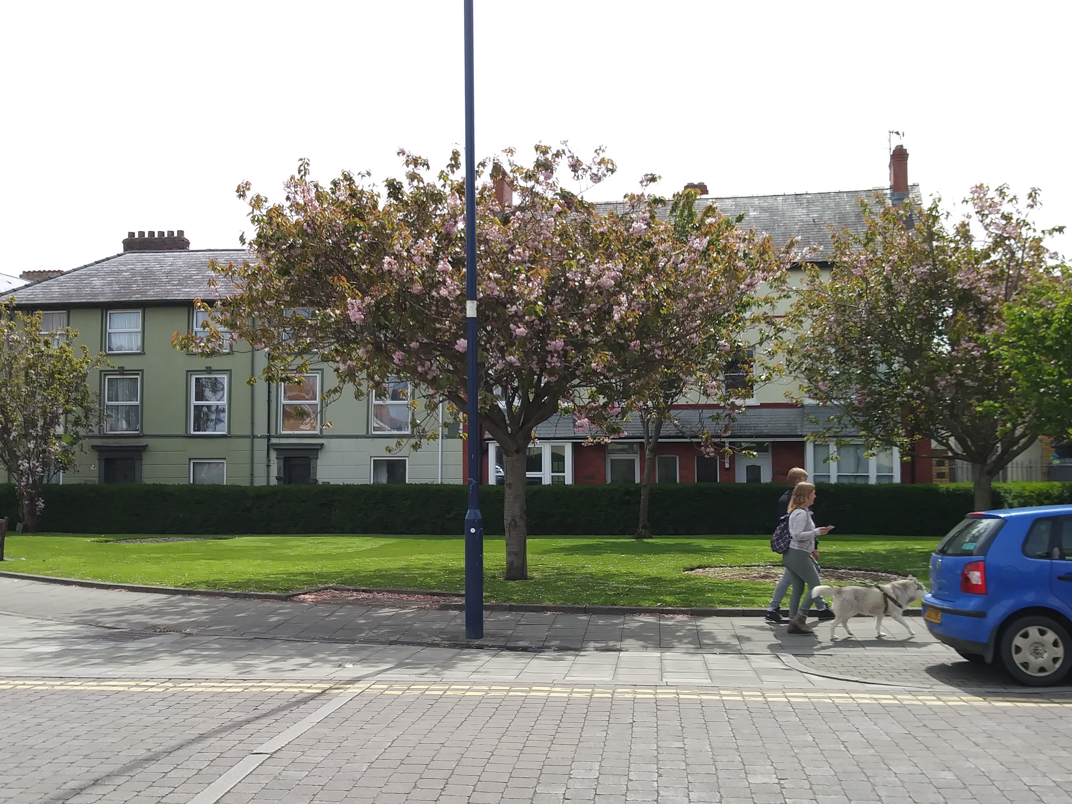 Аҧсшәа: Maes y Frenines, Aberystwyth, tua'r dwyrain